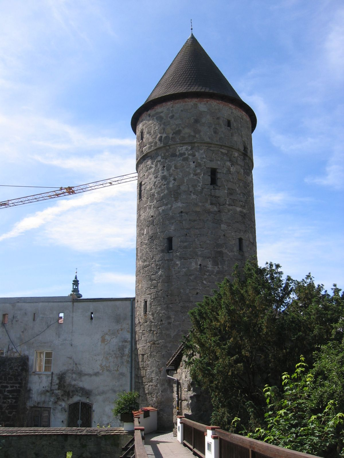 Scheiblingturm